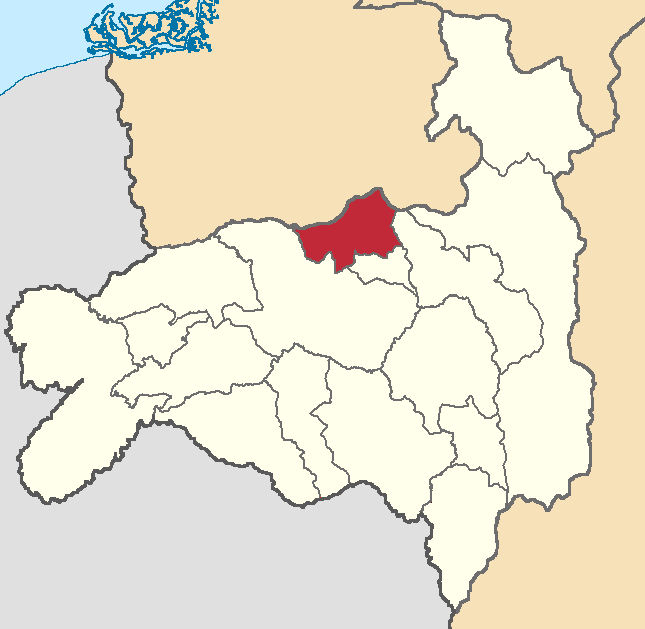 Mapa localizador del cantón en Loja, Ecuador